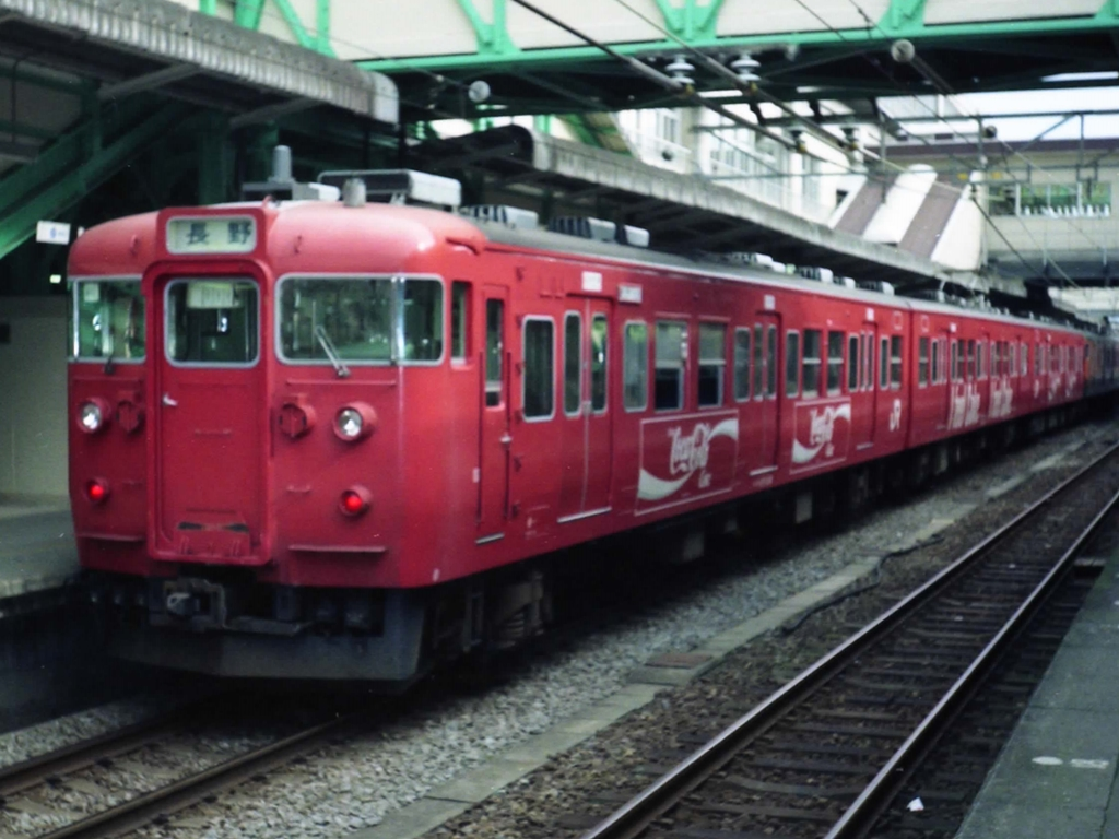 East Japan Railway Company, EMU type 115 Advertising "Coca-Cola" at Takasaki Sta.